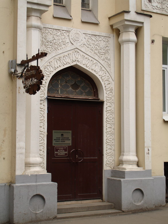 Вход в Дом Асадуллаева, г. Москва, Россия